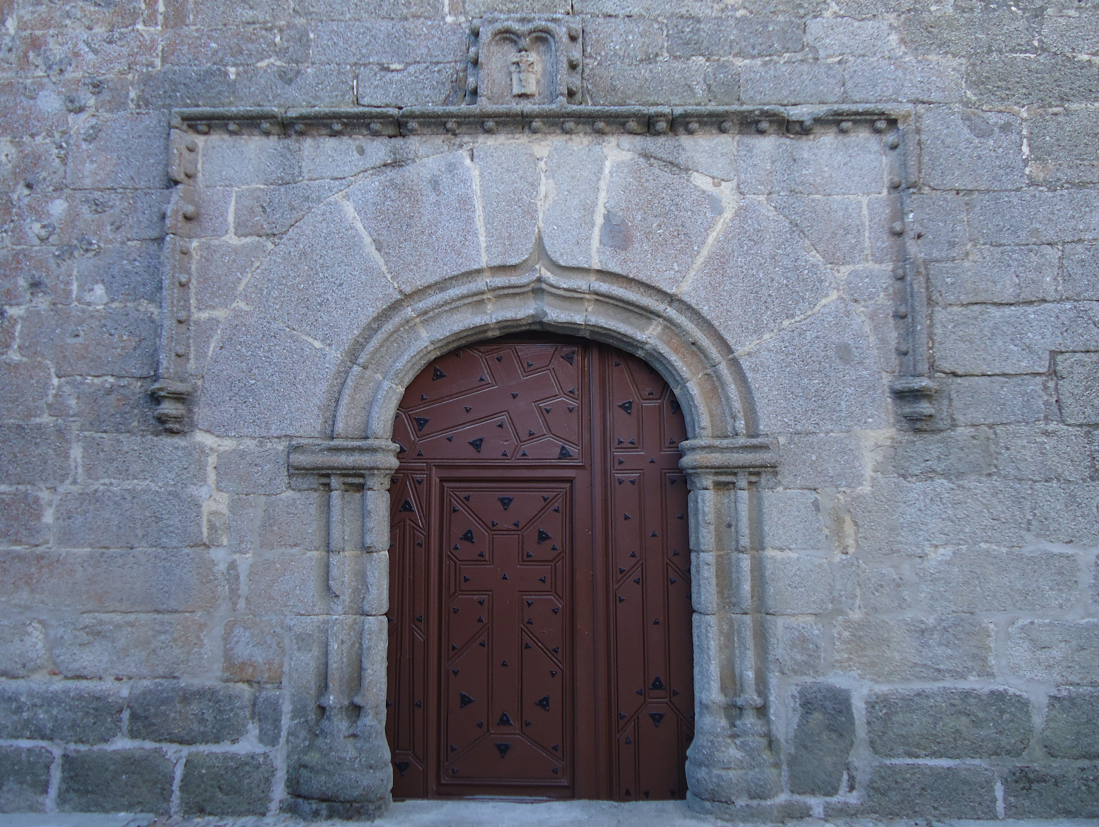 Portada norte de la Iglesia parroquial de Nuestra Señora del Castillo, Macotera